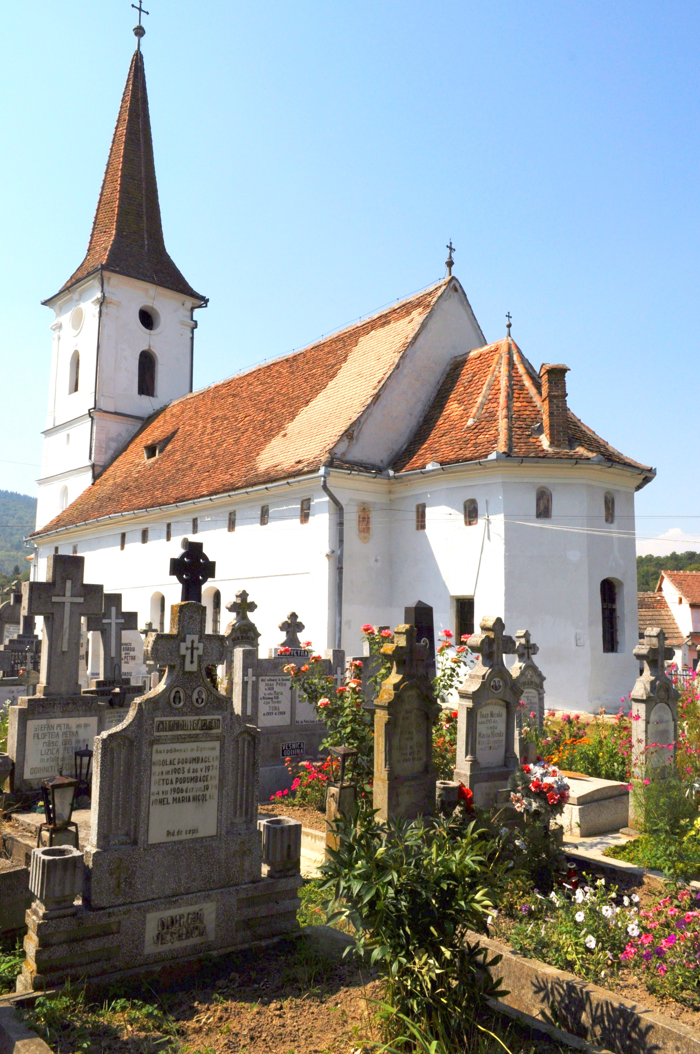 Biserica ortodoxă „Sfânta Treime”